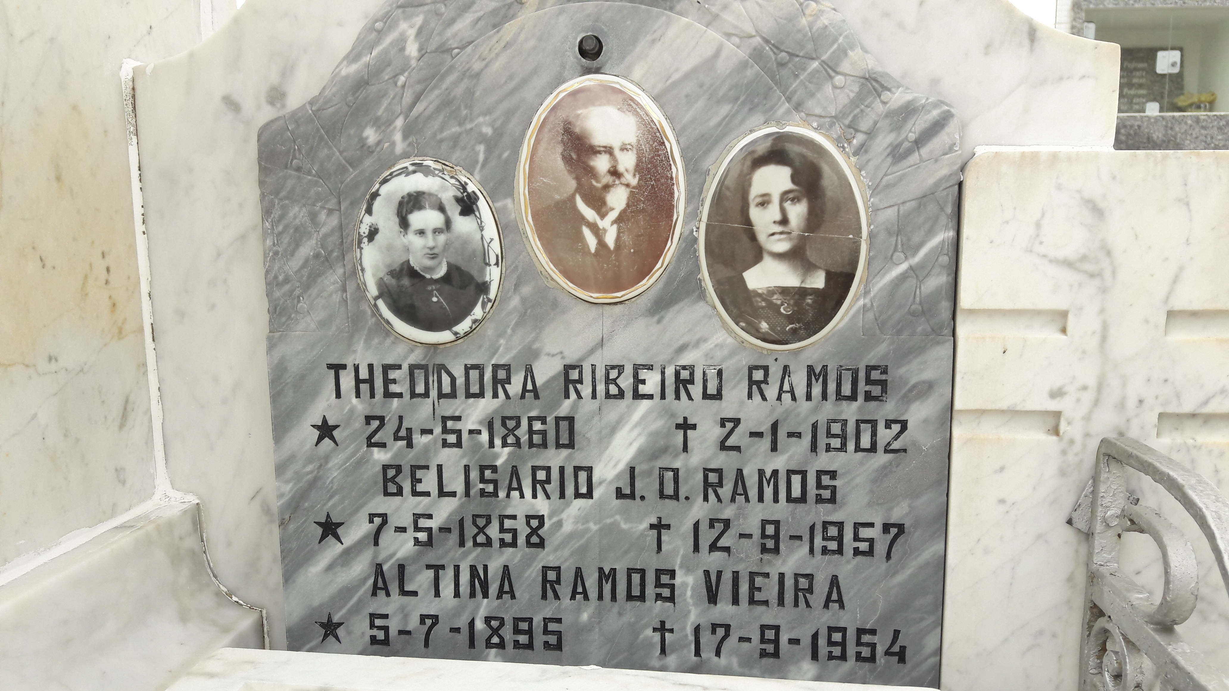 Sepultura de Belisário Ramos no Cemitério Cruz das Almas, Lages, Santa Catarina